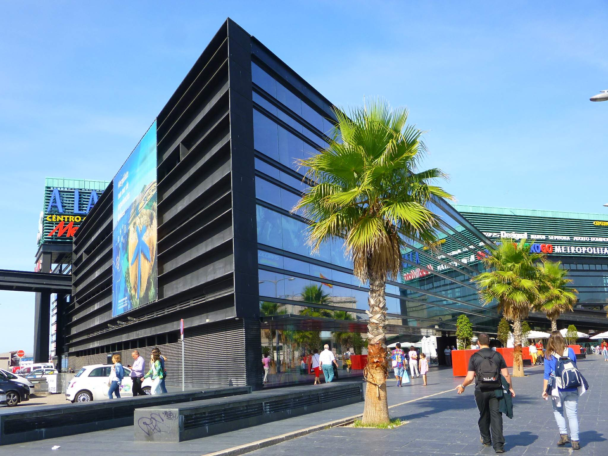 Centro Comercial A Laxe (Vigo)